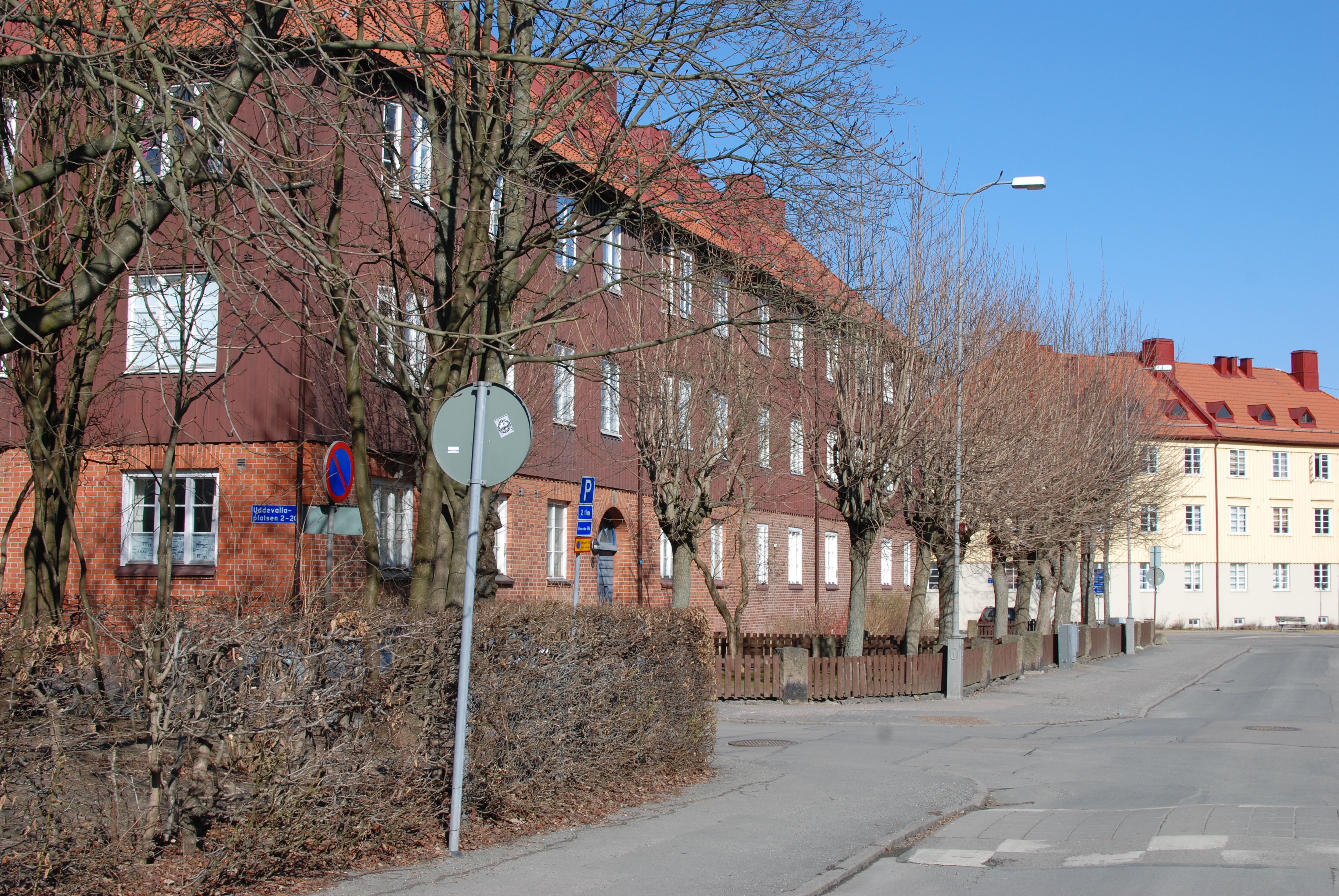 Uddevallagatan i Göteborg.